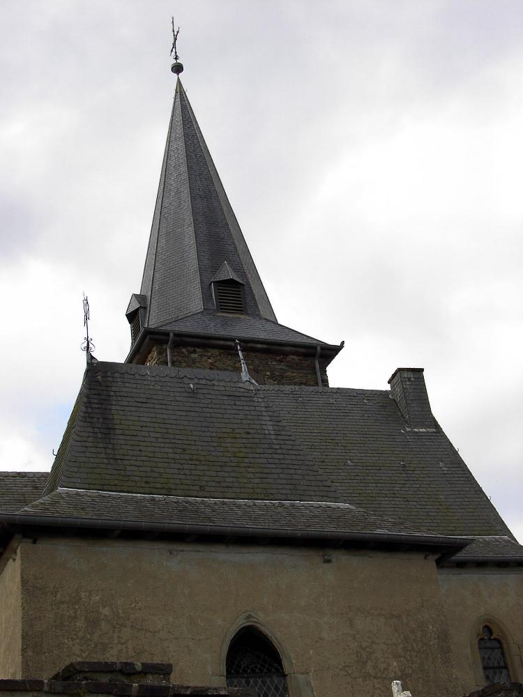 D'Klierwer Kapell vun der Munzer Kierch vu baussen. Photo vum User Pear 15:53, 20 August 2006 (UTC) Munzen Kategorie:Gemeng Munzen